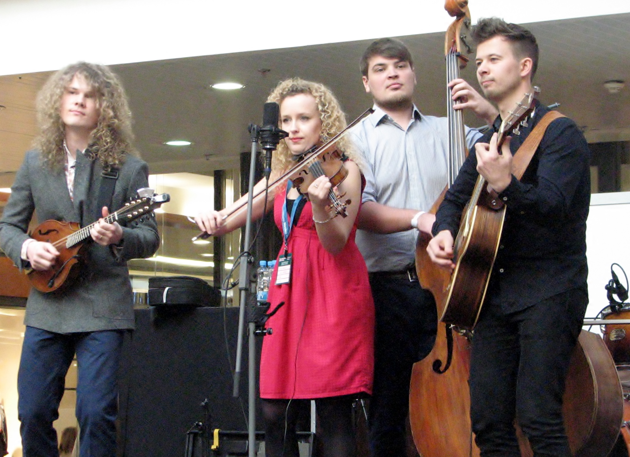 Curly Strings esinemas Tallinn Music Weekil